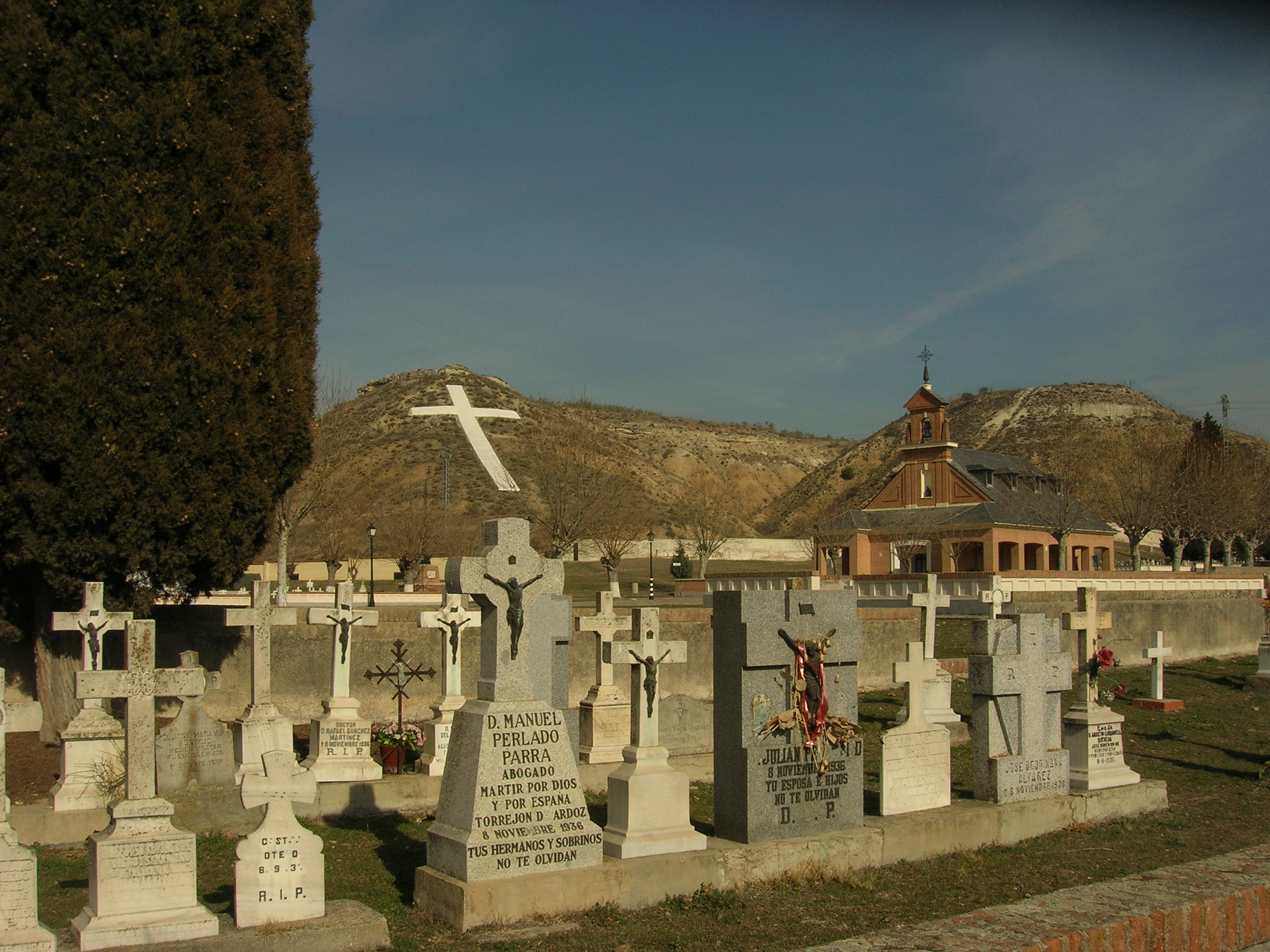 Vista de lápidas en la Fosa III del cementerio de las Matanzas de Paracuellos. Al fondo, la ermita y la gran cruz visible desde Barajas